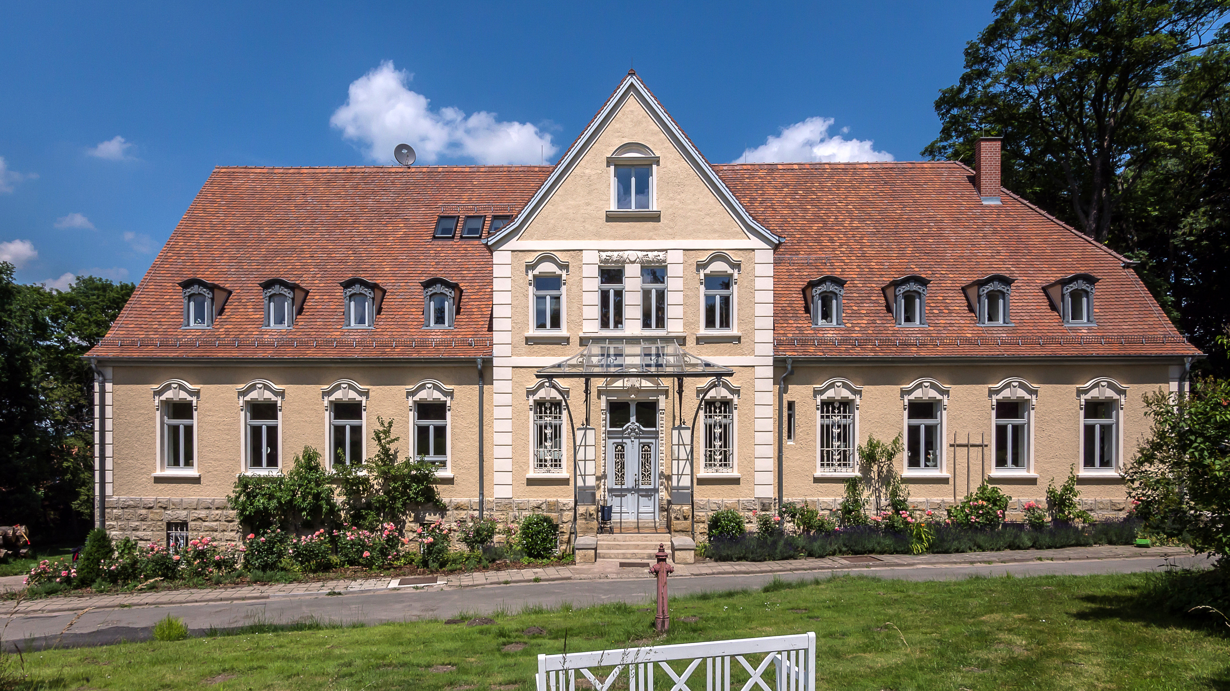 Mechelroda Dorfstraße 17e Gutshaus und Tor